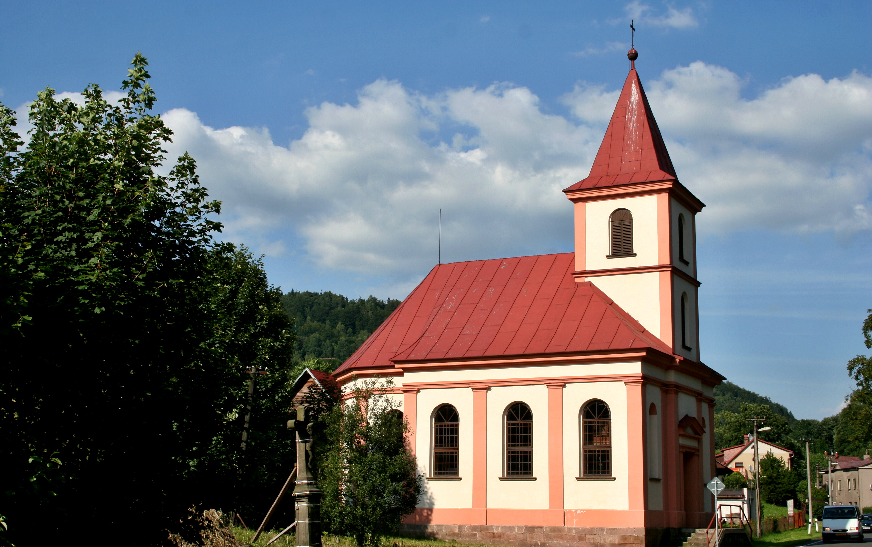 Petříkovice-Kaple Svaté Rodiny